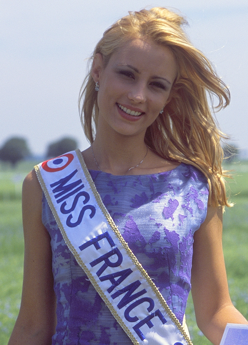 Elodie Gossuin, Miss France 2001, lors des Journées nationales du lin en Picardie, en juin 2001.